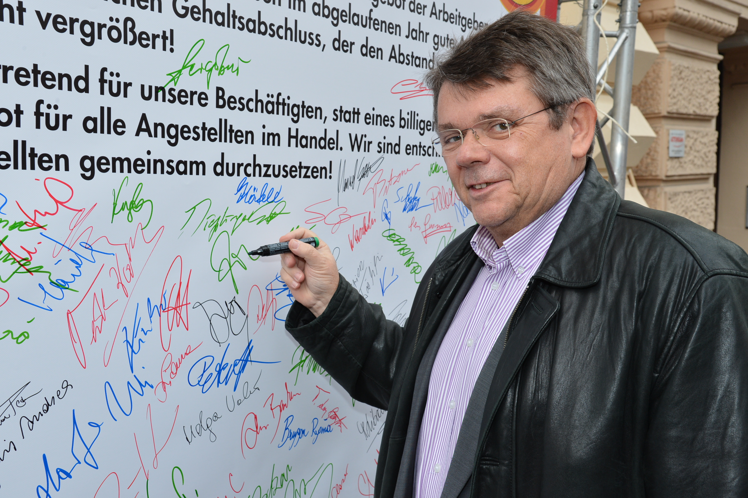 Vorsitzender der GPA-djp Wolfgang Katzian